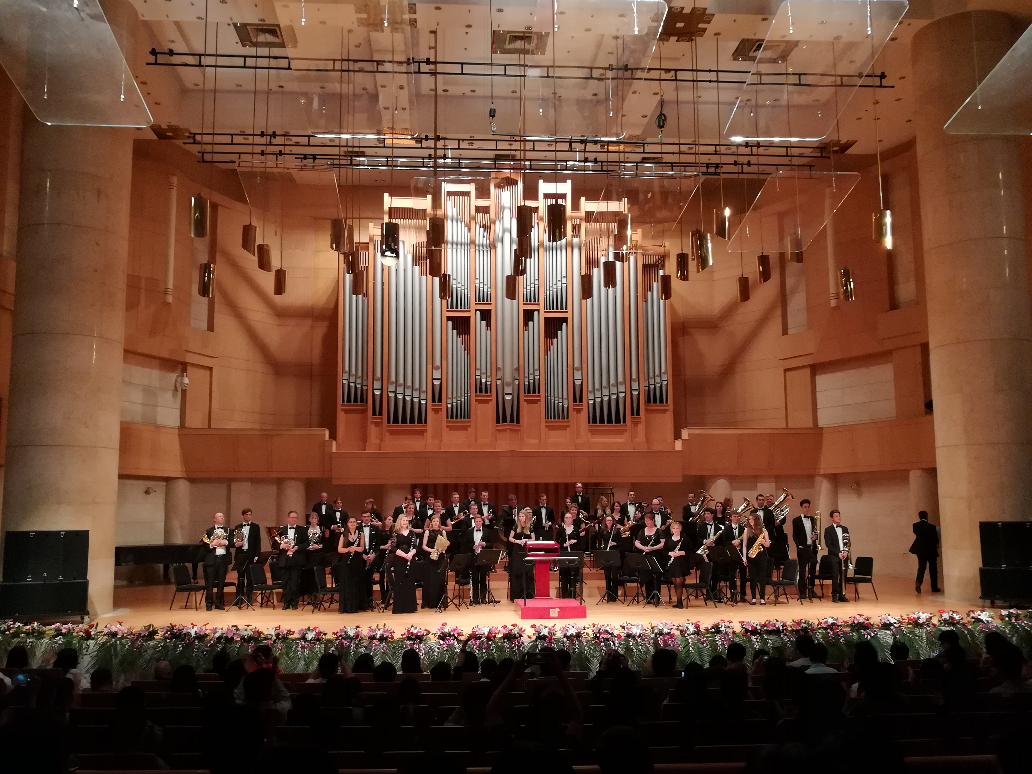 辉煌德奥之声—德国巴伐利亚交响管乐团音乐会，北京中山公园音乐堂